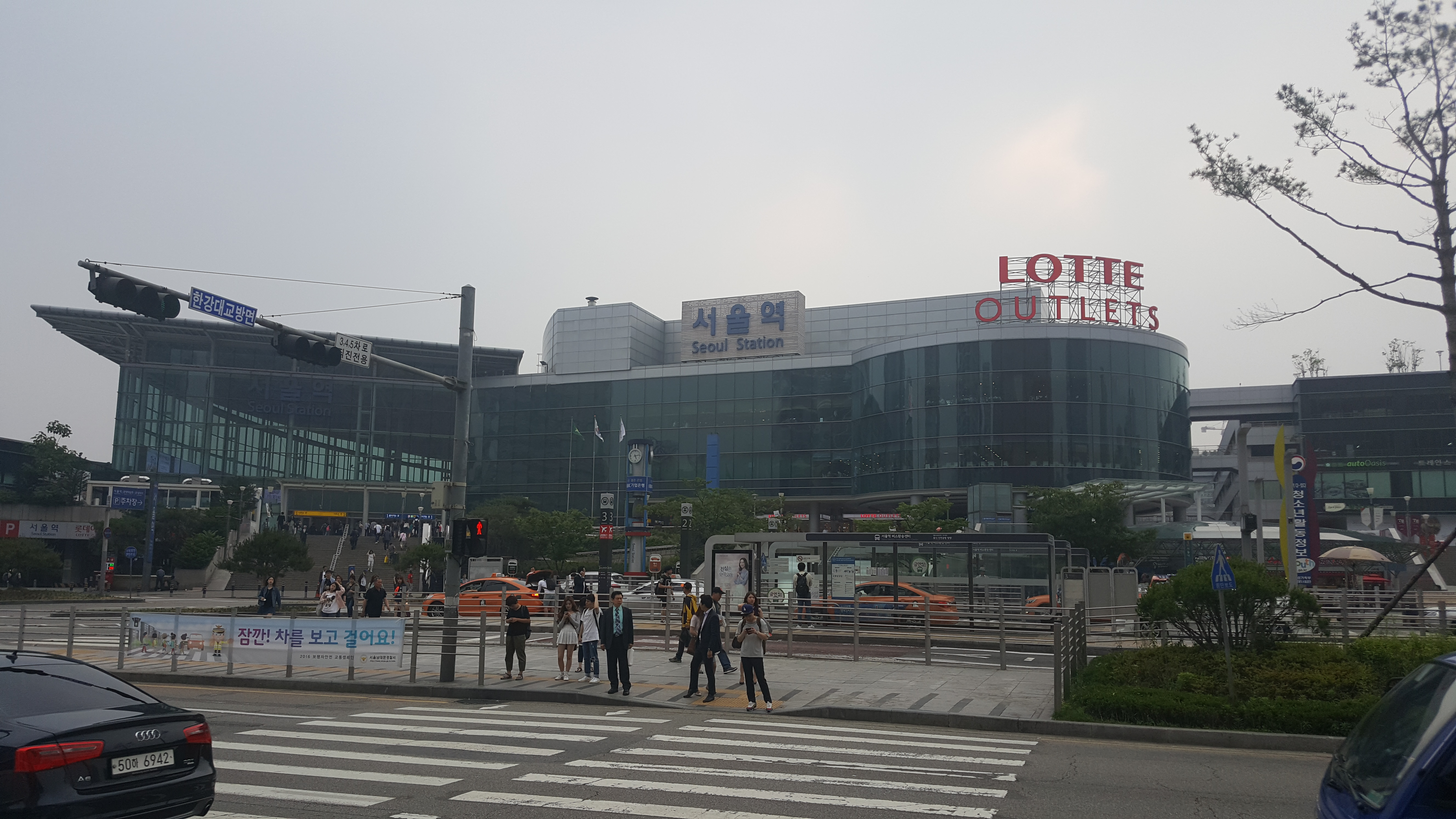 2016년 5월 서울역, 왼편에 롯데마트도 보인다.